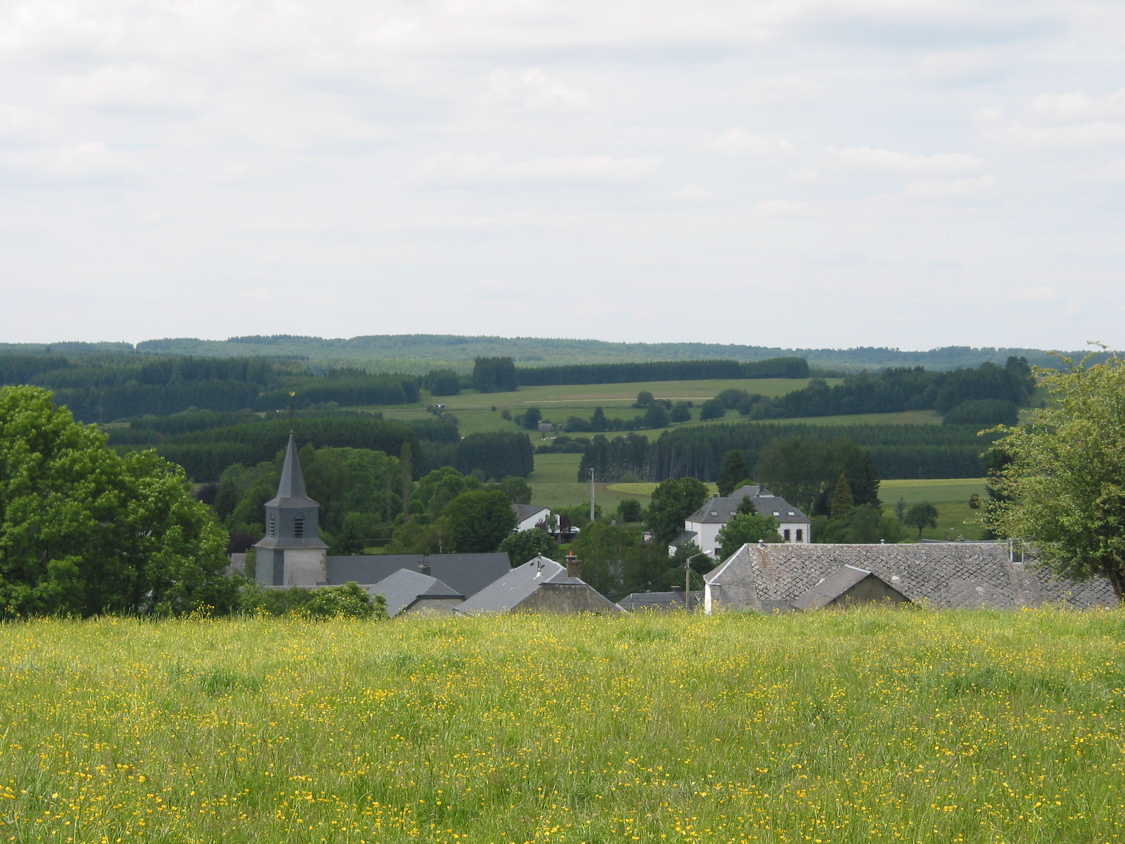 Anlier (Belgique), le village au printemps.